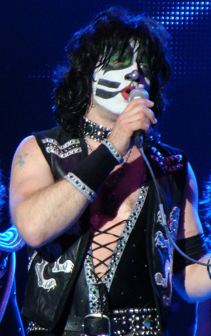 Eric Singer, en una actuación del grupo KISS en Vitoria-Gasteiz, en el Azkena Rock Festival.